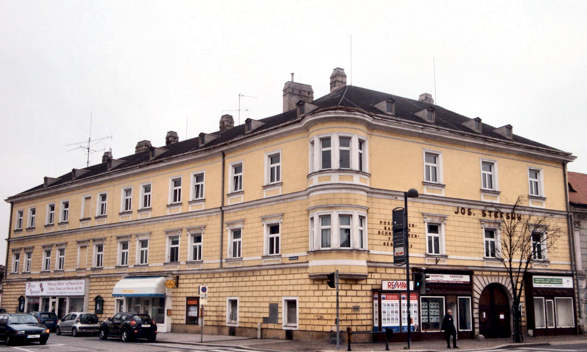 Freyseggsches Herrschaftshaus, Stockerau, 2014, heute Fa. Jos. Stefsky